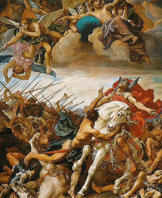 Joseph Blanc (Français, 1846-1904): La bataille de Tolbiac, toile marouflée, Panthéon de Paris, France.